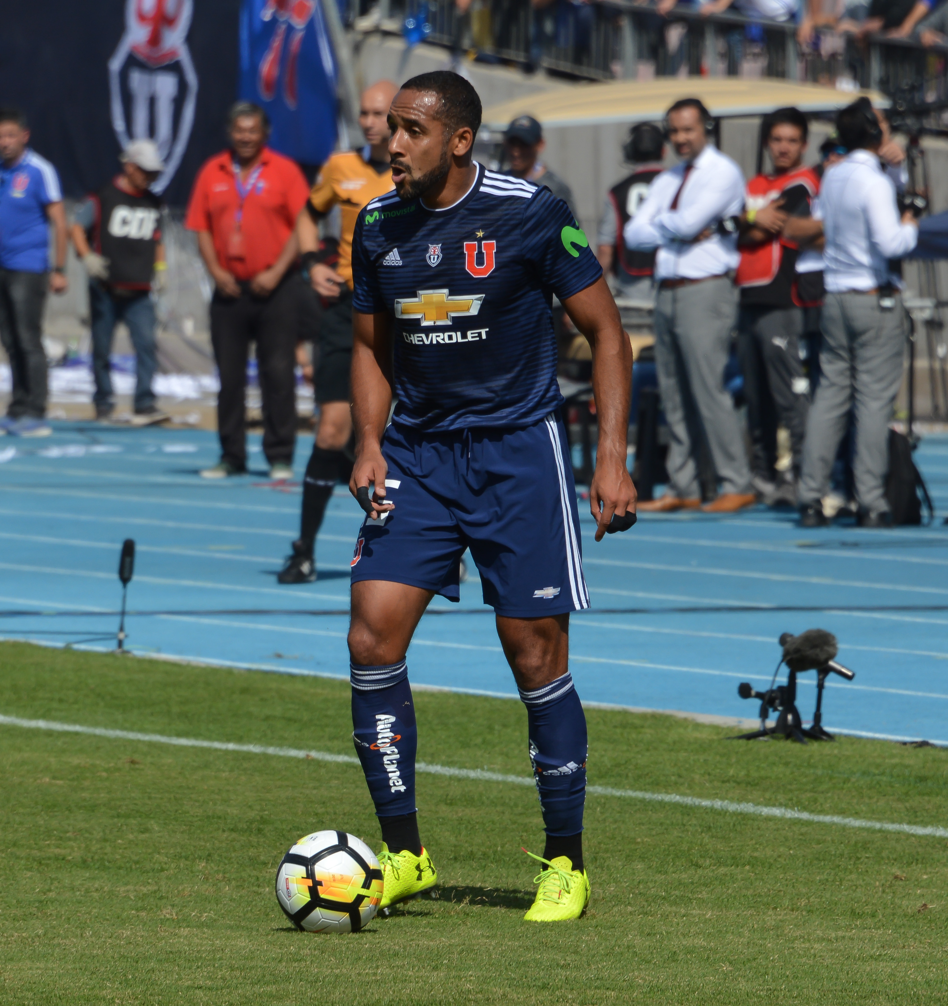 Universidad de Chile v Colo-Colo, Estadio Nacional, Santiago, Chile.